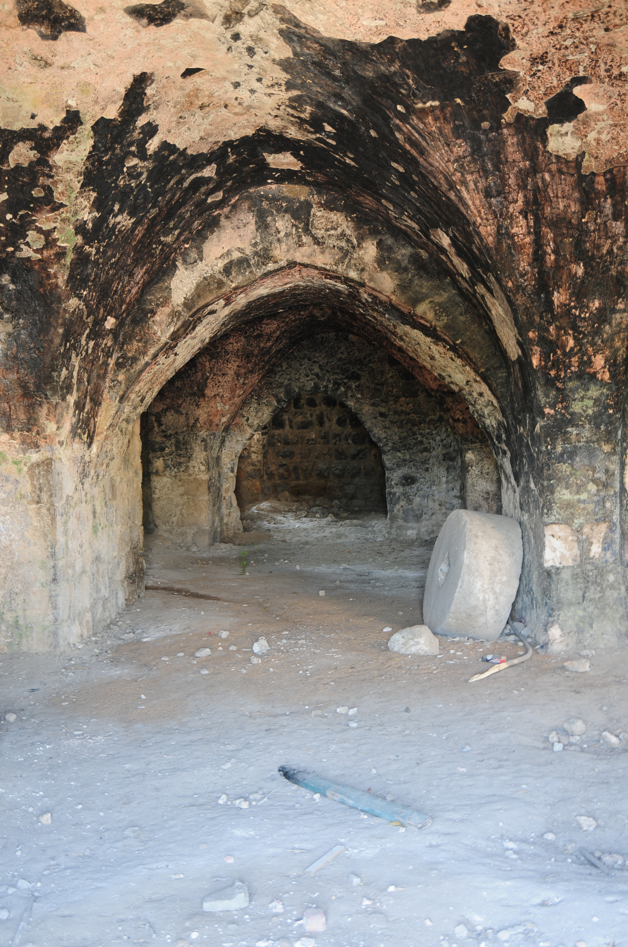 אבן ה"מֶמֶל" היא האבן המסתובבת על אבן ה"יָם", ומרסקת את הזיתים.